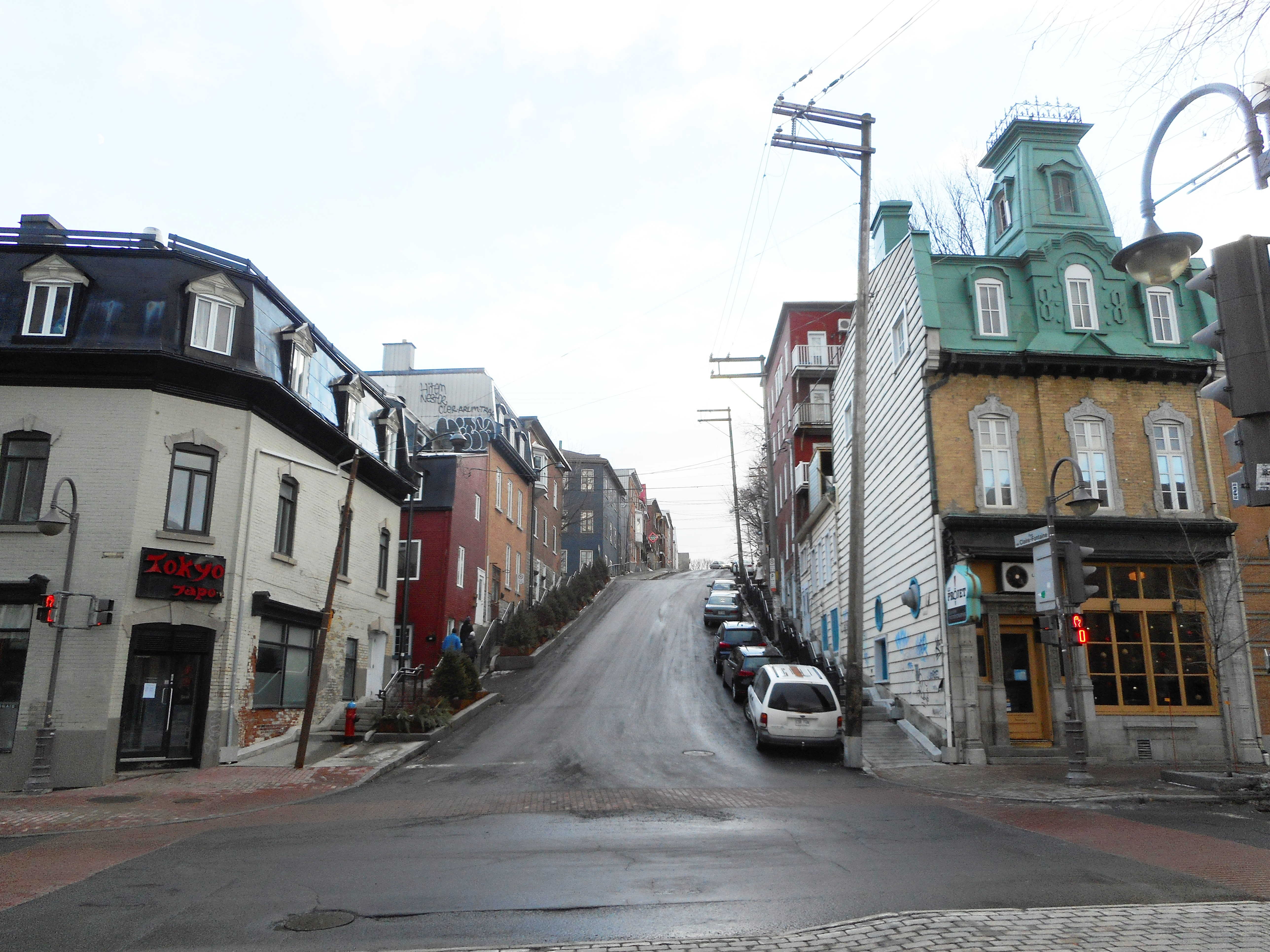 Rue de Claire-Fontaine, vue de la rue Saint-Jean, Québec